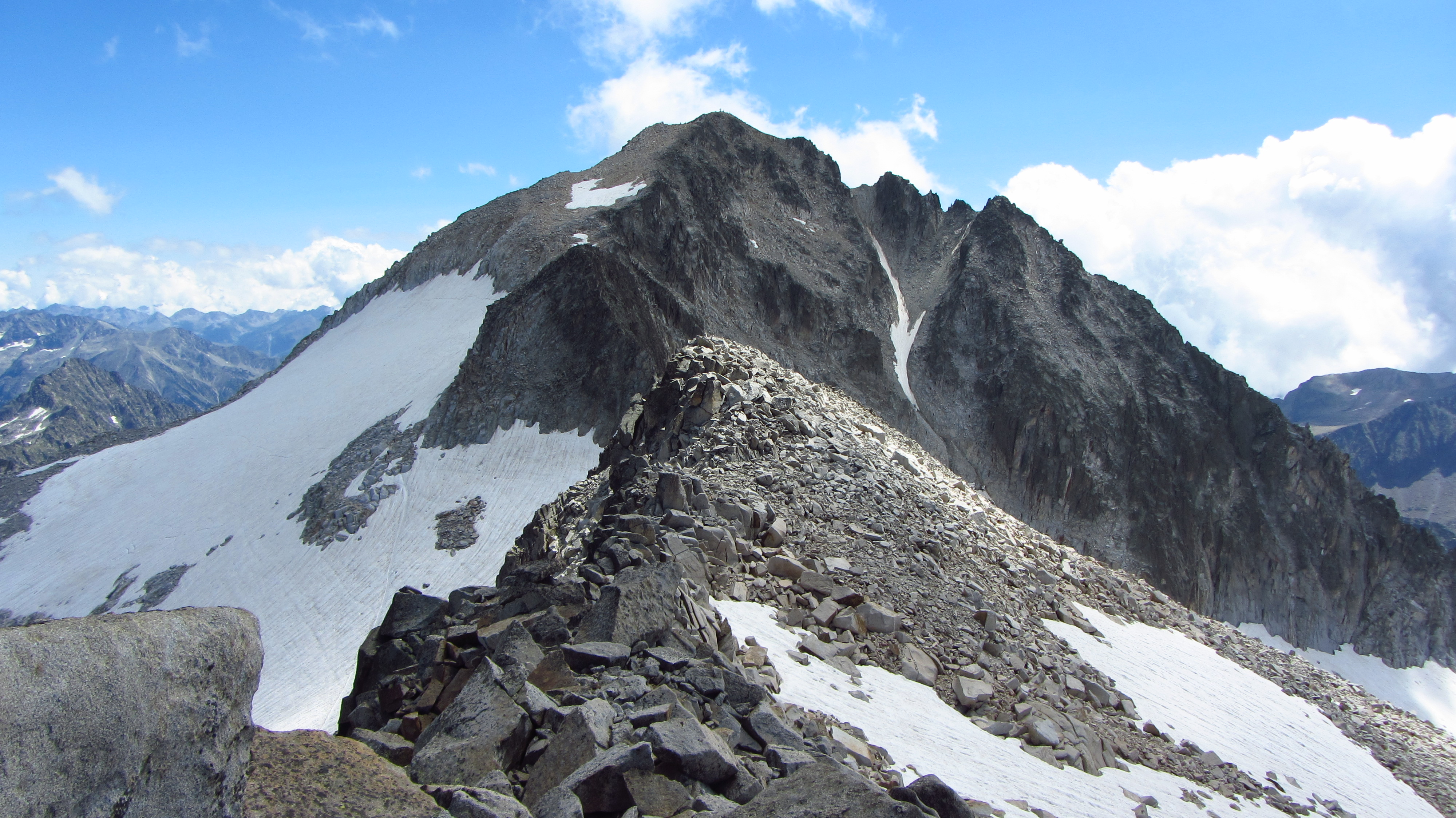 Aneto (3.404 m.) i Tuca del Coll de Corones (3.286 m.) a sota, presos des del Pic de Corones (3.298 m.). Massís de la Maladeta.